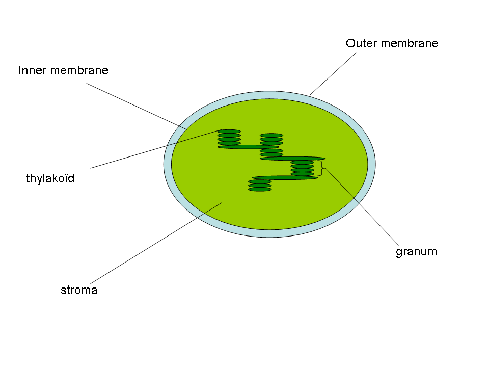 structuur van een thylakoÏd